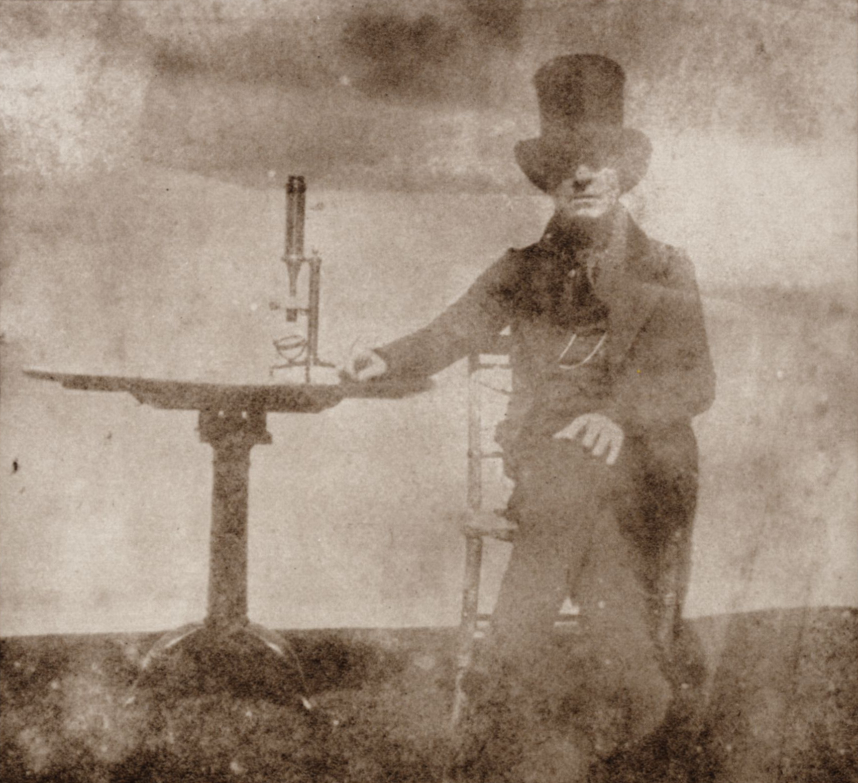 Talbot, William Henry Fox: Porträt von Sir David Brewster